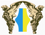 логотип Національного банку України